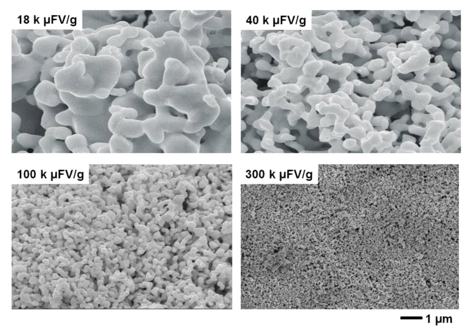 REM-Aufnahmen von Tantal-Pulver mit unterschiedlichen Korngrößen